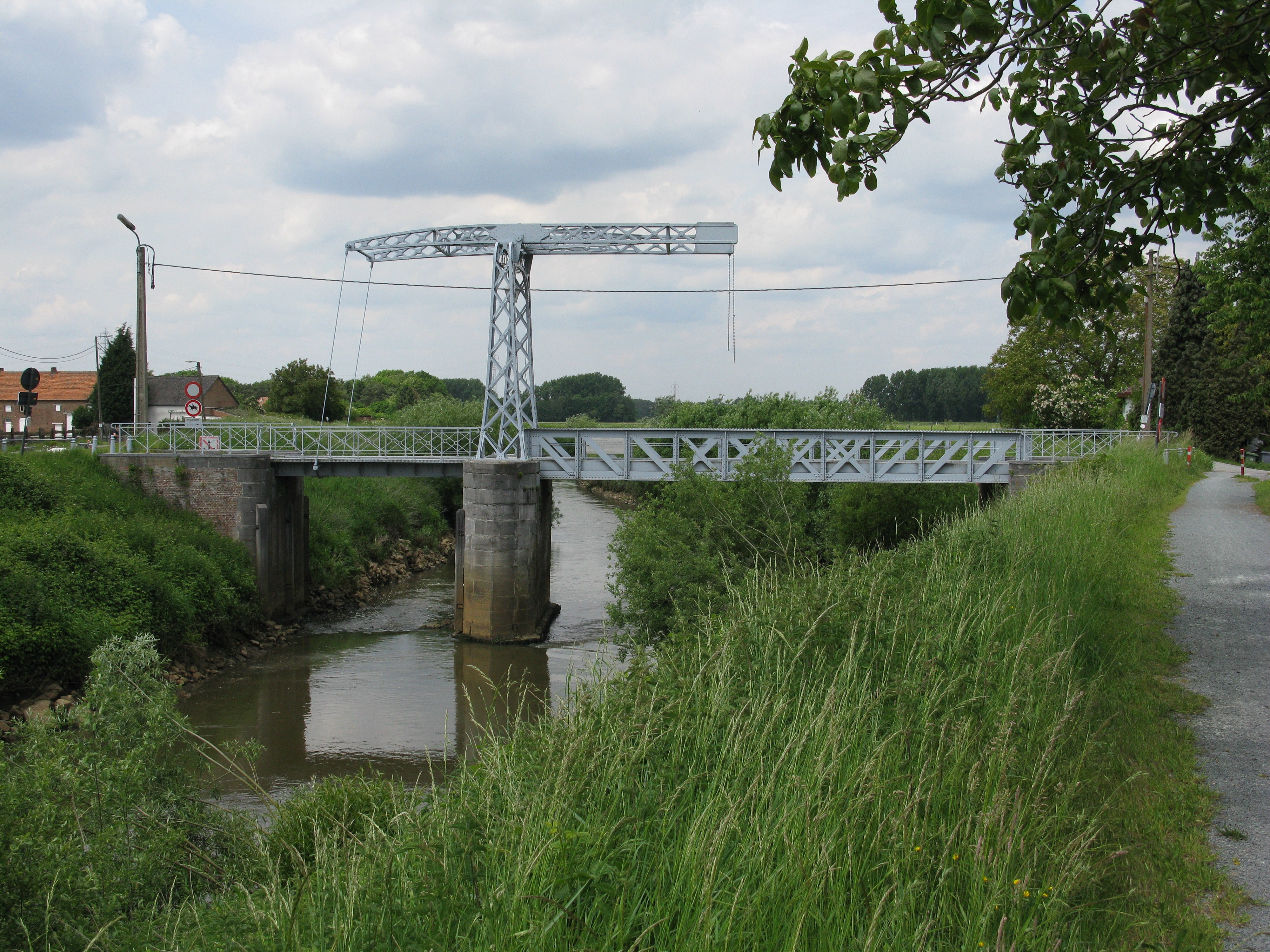 Oude Hansbrug over de Dijle in Keerbergen-Haacht